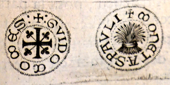 reproduction d'une monnaie de chatillon t-Paul.